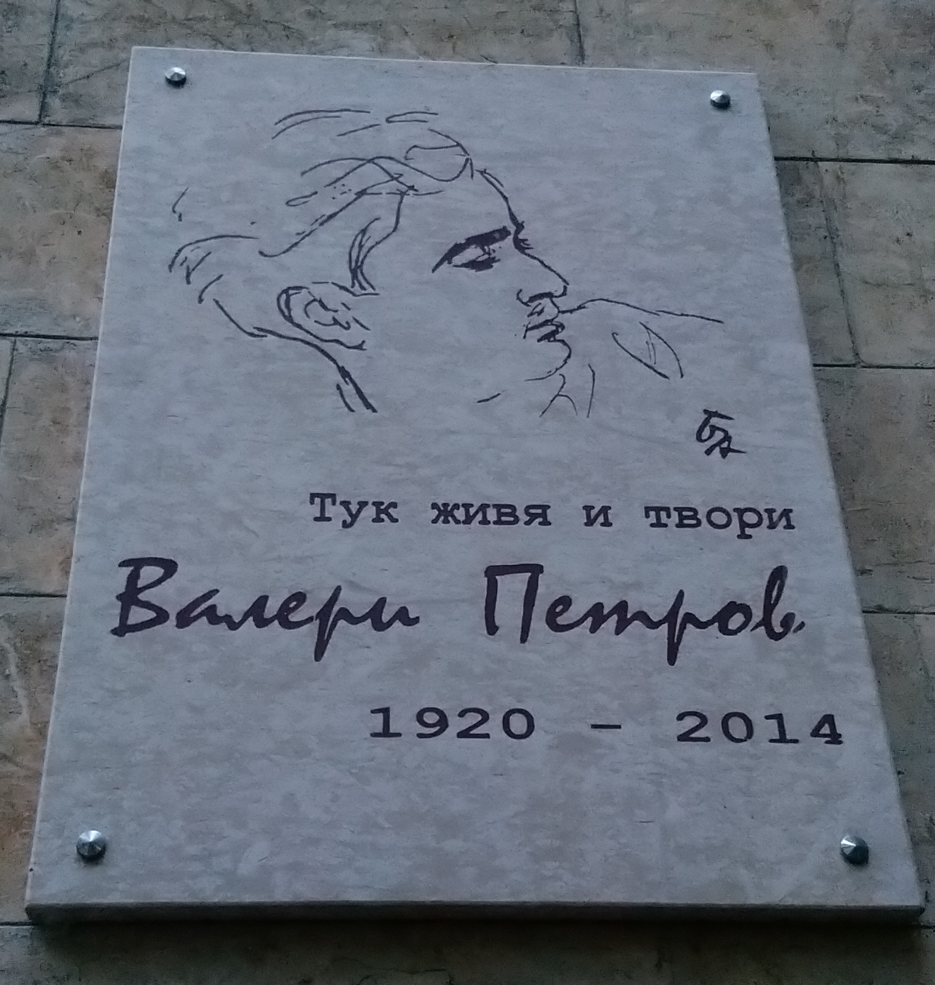 Паметна плоча на писателя Валери Петров, ул. Елин Пелин 8, София